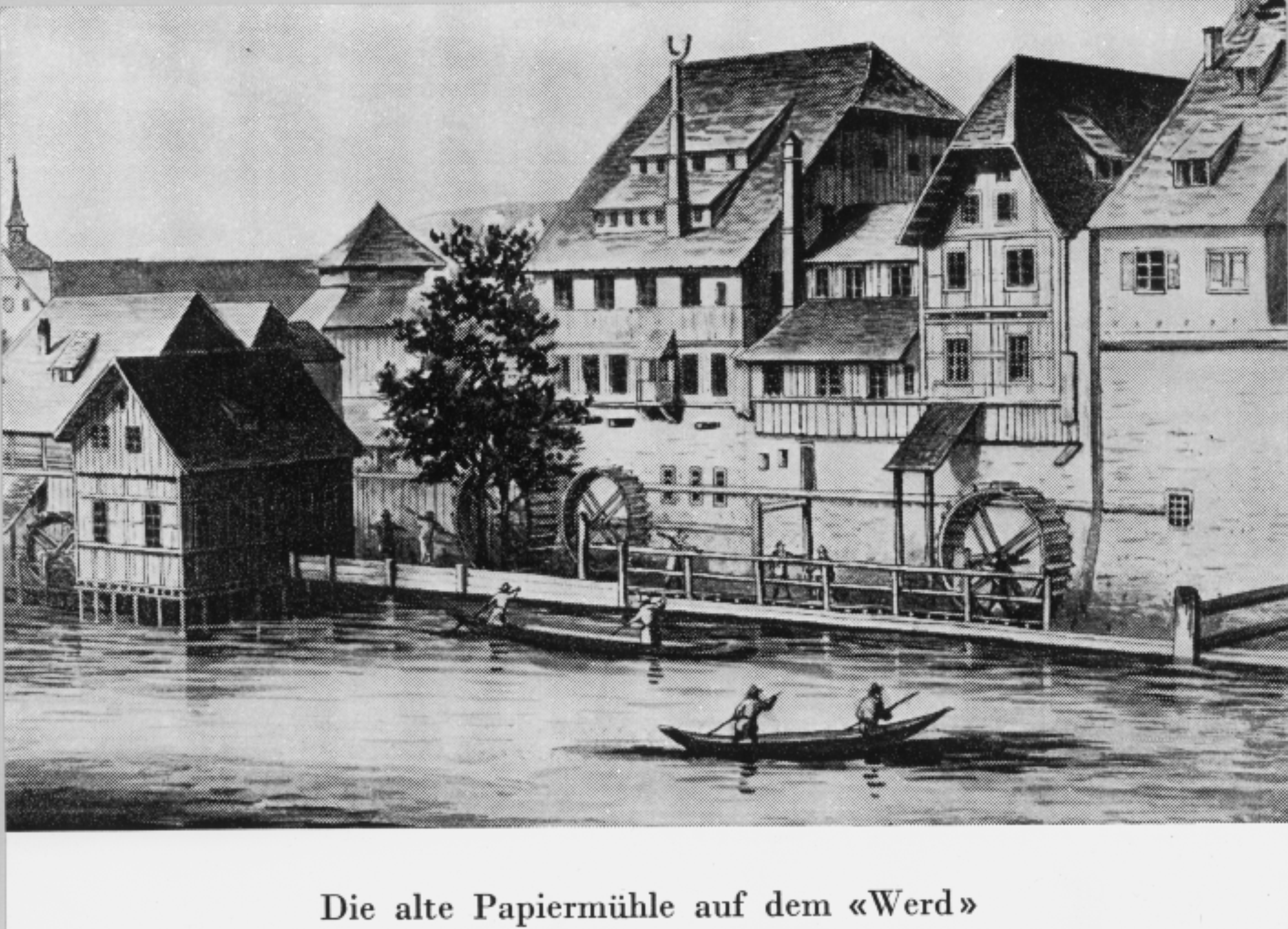 Papierwerd, Zürich, Schweiz, 1725